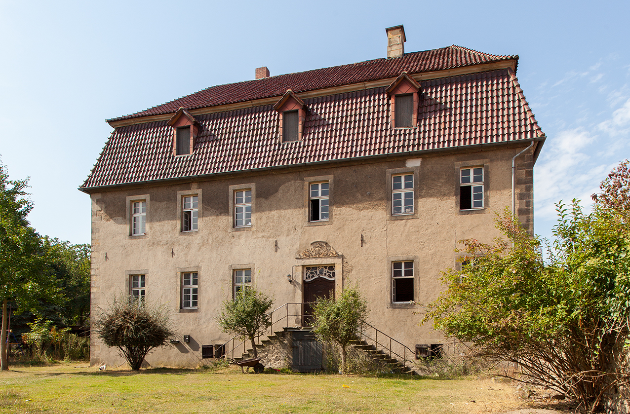 Stöckerscher Hof, Stemmen (Kalletal) This is the photograph of an architectural monument. It is part of the list of cultural monuments of Kalletal, no. 7